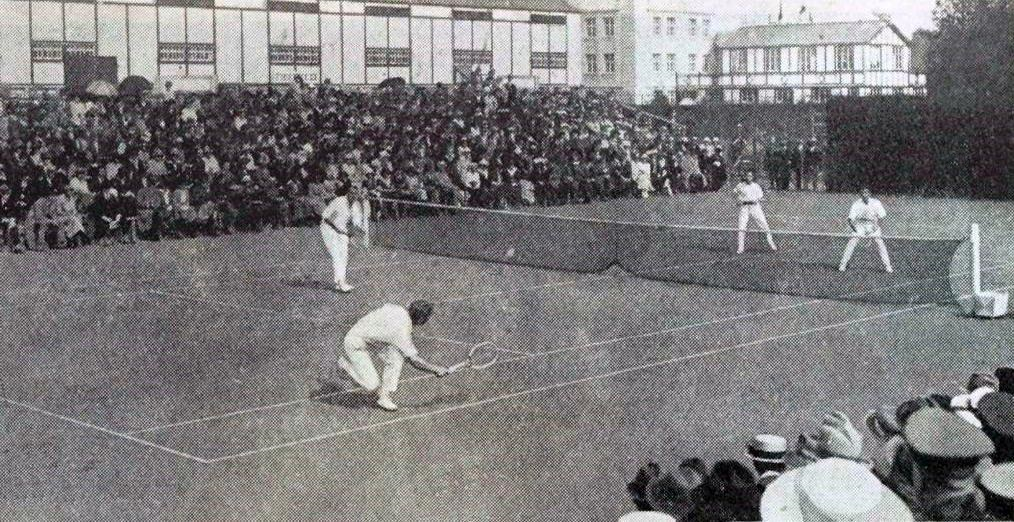 Le tennis aux JO d'Anvers en 1920.